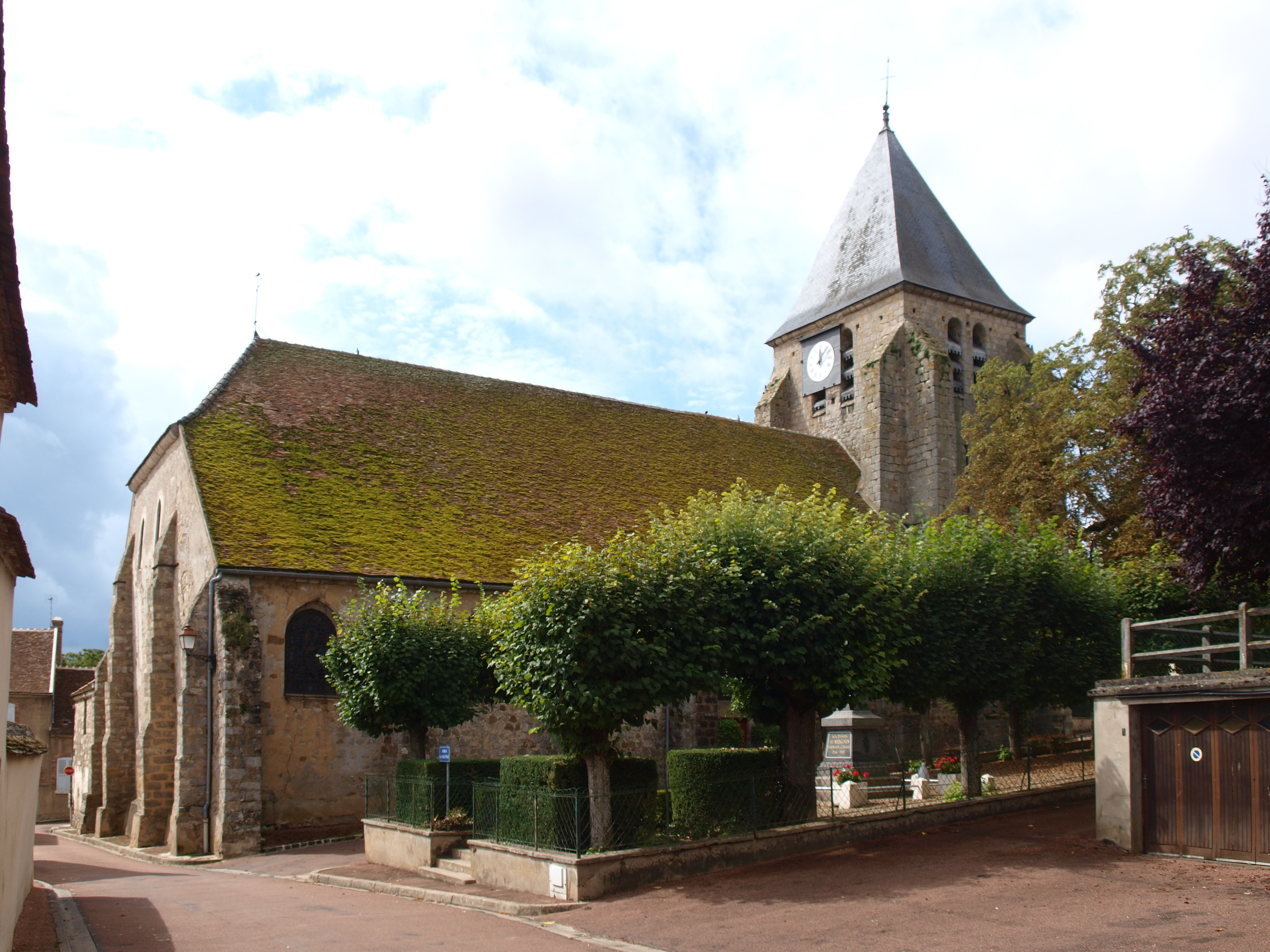 Sergines (Yonne, France) ; église